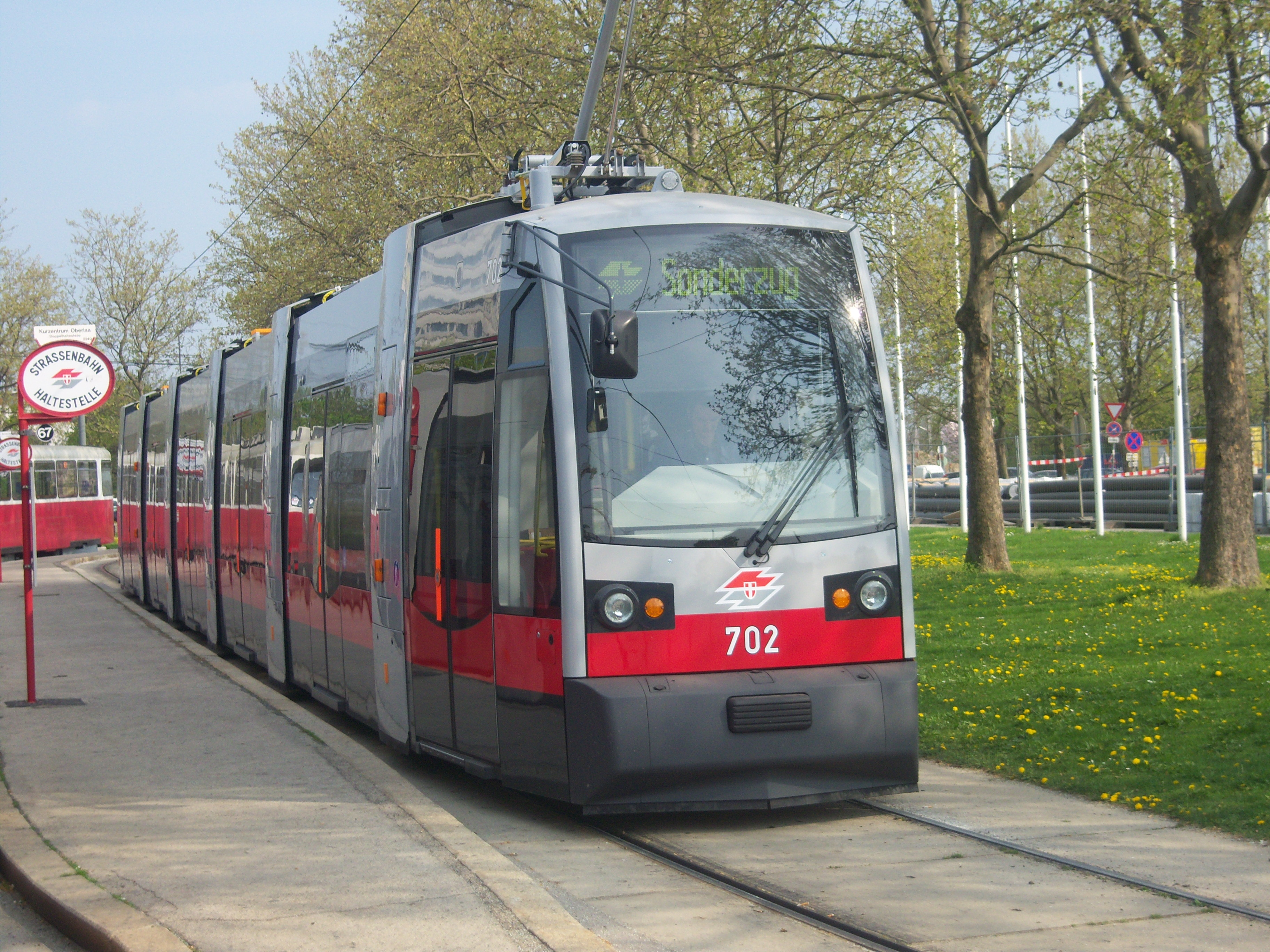 Neuer Straßenbahntyp ULF B1 während einer Testfahrt auf der Linie 67 im Bereich Oberlaa